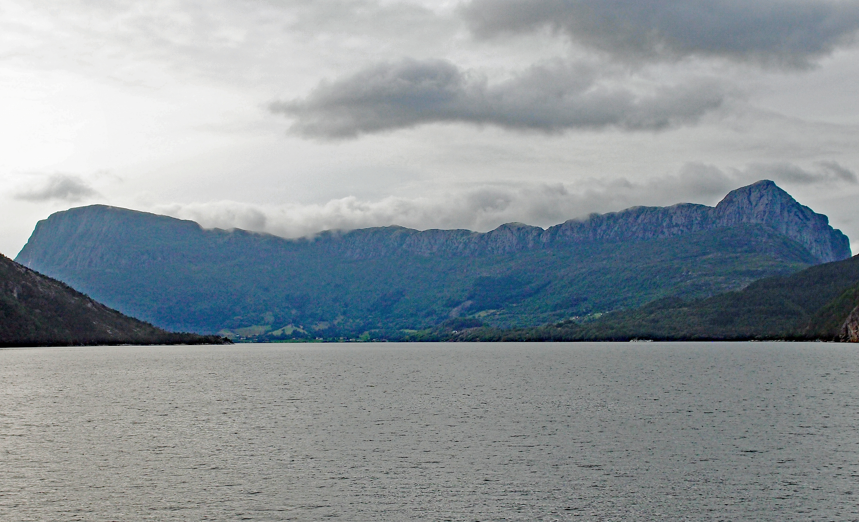 Fjellet Lihesten i Hyllestad kommune i Sogn og Fjordane, sett frå Indrefjorden i Lifjorden. Risnesnipa (777moh) til venstre, Gygrekjeften (710 moh) til høgre i biletet. 16. juni 1936 flaug post- og passasjerflyet "Havørn" i fjellveggen nokre titals meter under toppen av Risnesnipa. Dette var den første flyulukka i sivil norsk luftfart. Alle ombord omkom, til saman 7 personar.